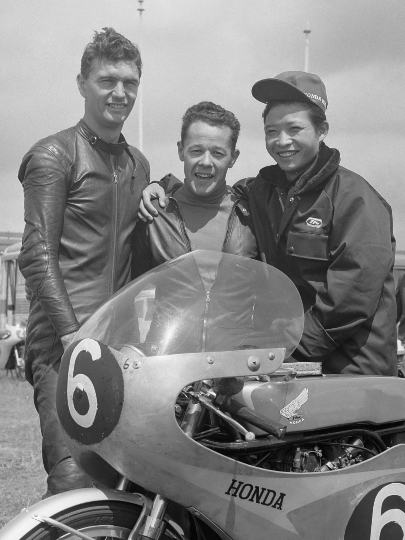 Kanshebbers TT in Assen. Jim Redman (Rhodesië), M. Luigi Taveri (Zwitserland), Kunimitsi Takahashi (Japan) 27 juni 1963